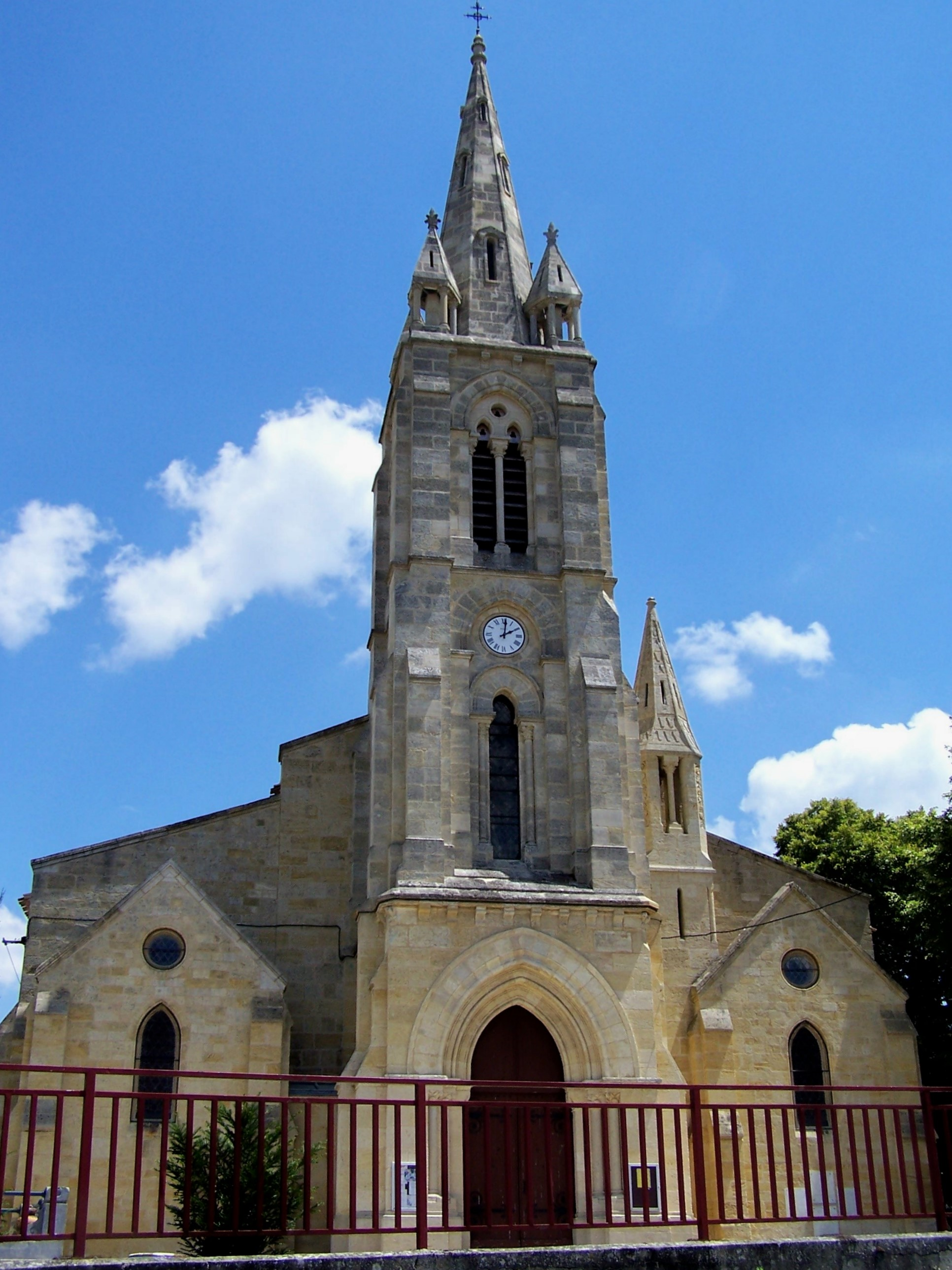 Église de Castres-Gironde, Gironde, France